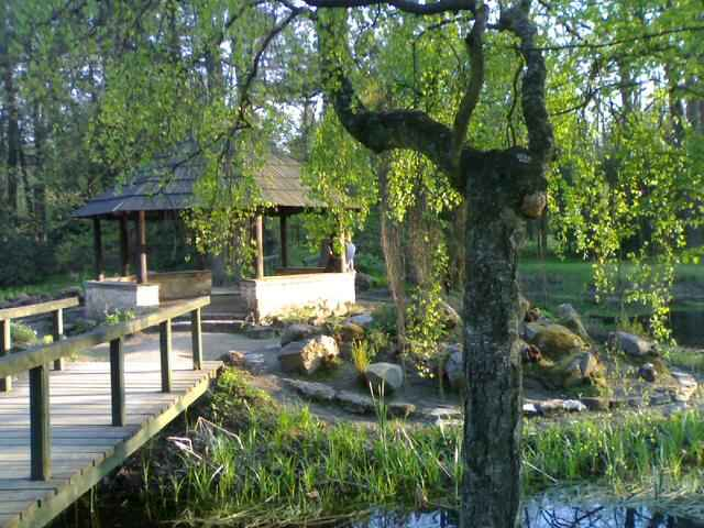 Brynek, ogród botaniczny